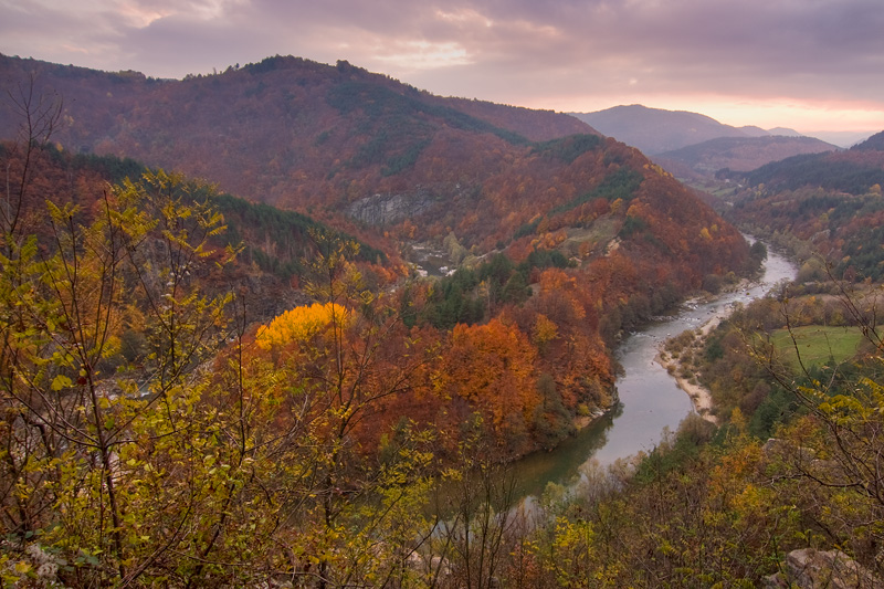 Řeka Arda v Bulharsku a Řecku na podzim